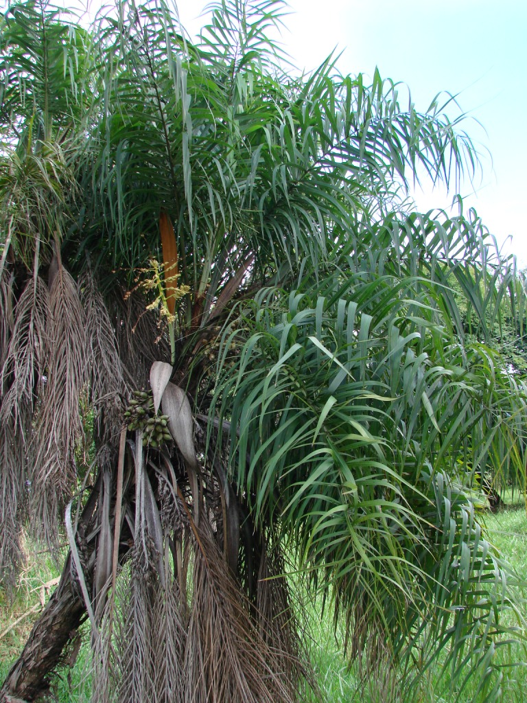 Syagrus flexuosa - ARECACEAE Parque Olhos D' Água - Brasília - Distrito Federal - Brasil.